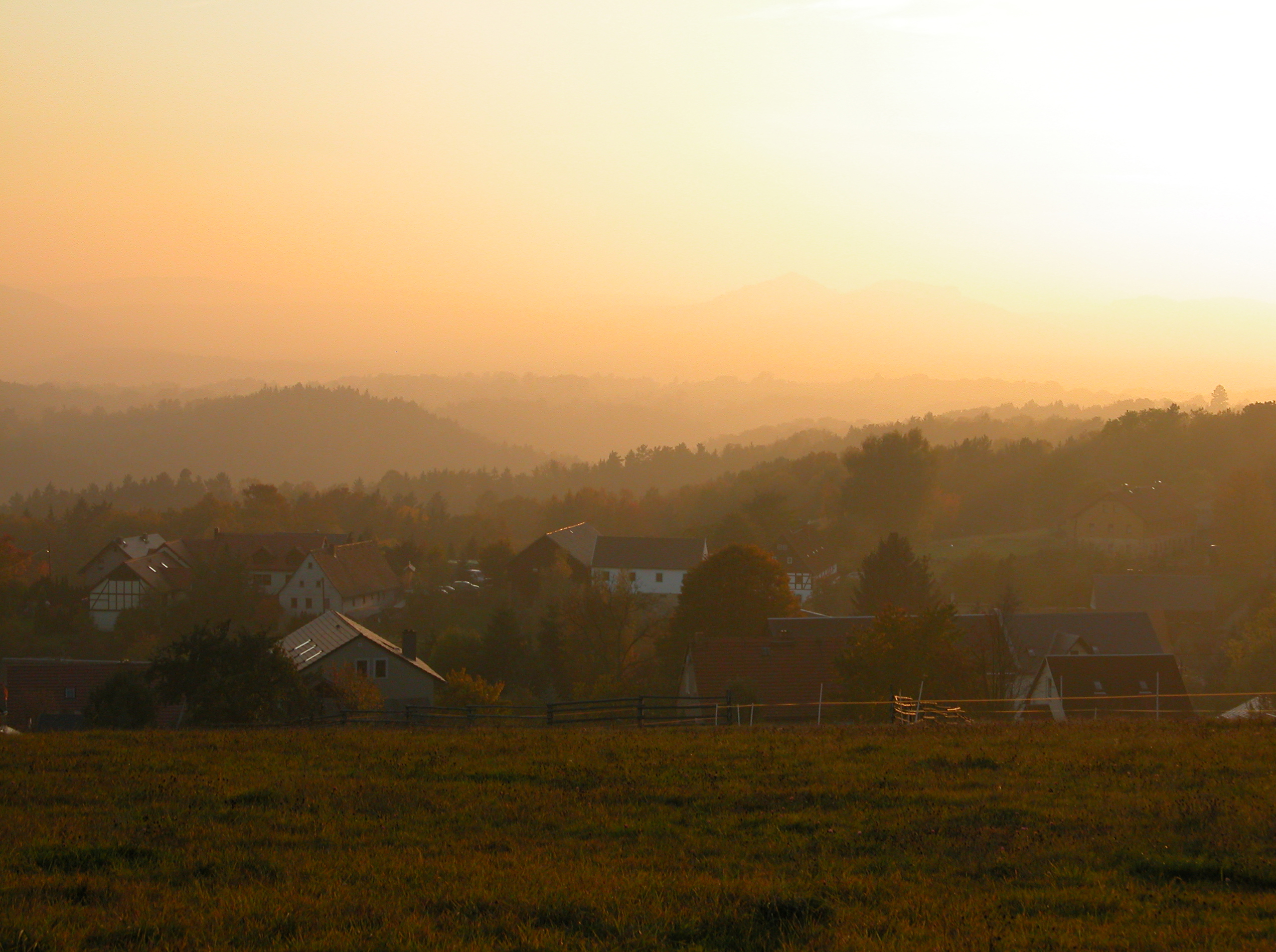 ÜBER SIEBEN BERGE MUSST DU GEHN 11.10.2008 01855 Mittelndorf (Kirnitzschtal), Sächsische Schweiz: Blick über Mittelndorf nach Südwesten. [DSCN34642.JPG]20081011800DR.JPG(c)Blobelt